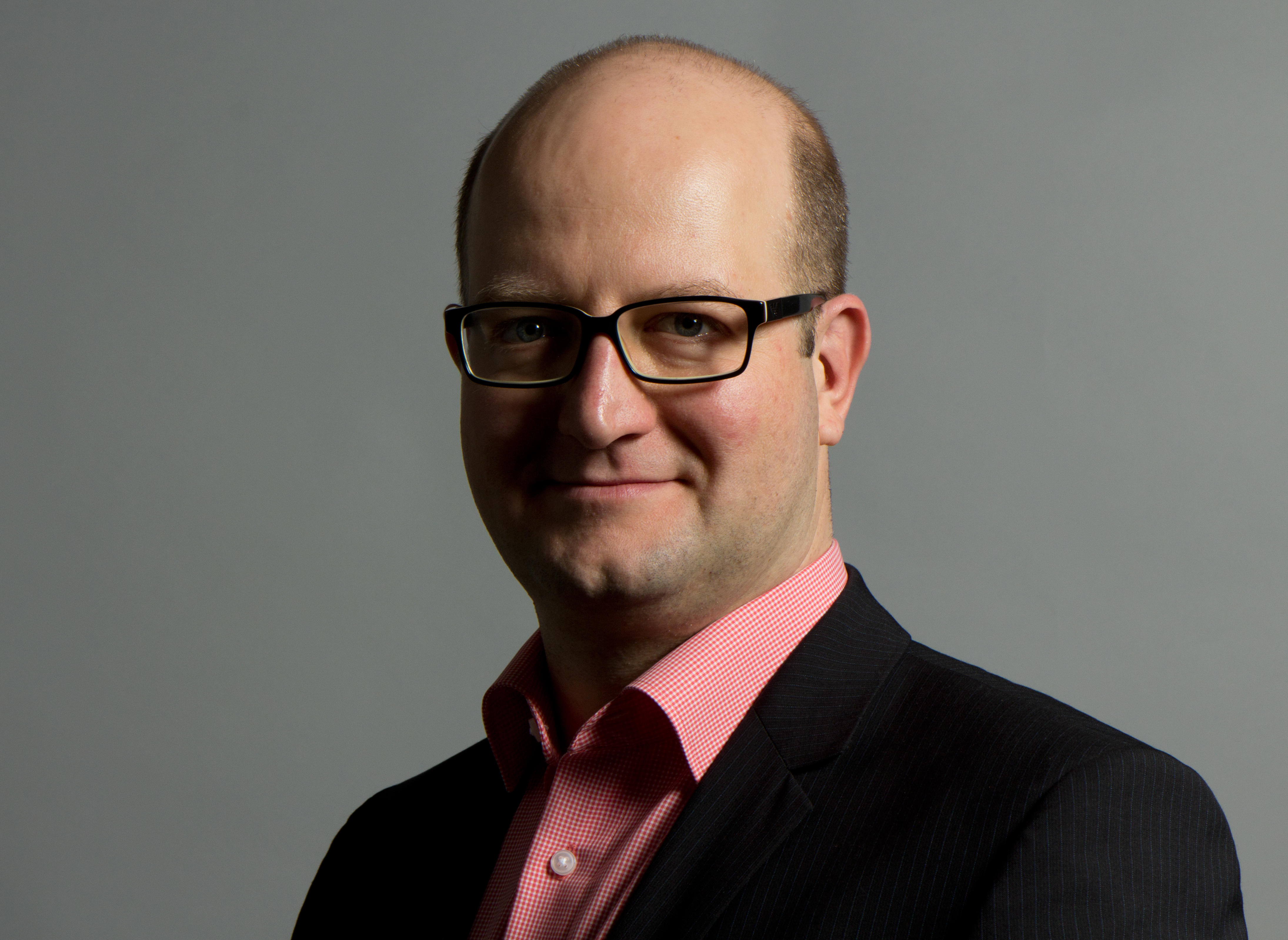 Falk Neubert (* 27. Januar 1974 in Dresden) ist ein sächsischer Politiker (Die Linke). Neubert ist von Beruf Koch und studierte Soziologie und Kommunikationswissenschaft an der TU Dresden und Abgeordneter des Sächsischen Landtags. Wikipedia im Landtag – Sachsen 17. bis 18. Dezember 2013 in DresdenDieses Foto wurde im Rahmen des Projektes „Wikipedia im Landtag“ erstellt. Fragen zur Nachnutzung Wenn Sie Fragen zur Nachnutzung dieses Bildes haben, können Sie sich jederzeit gern an wenden